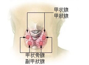 甲状腺和甲状旁腺 来源：